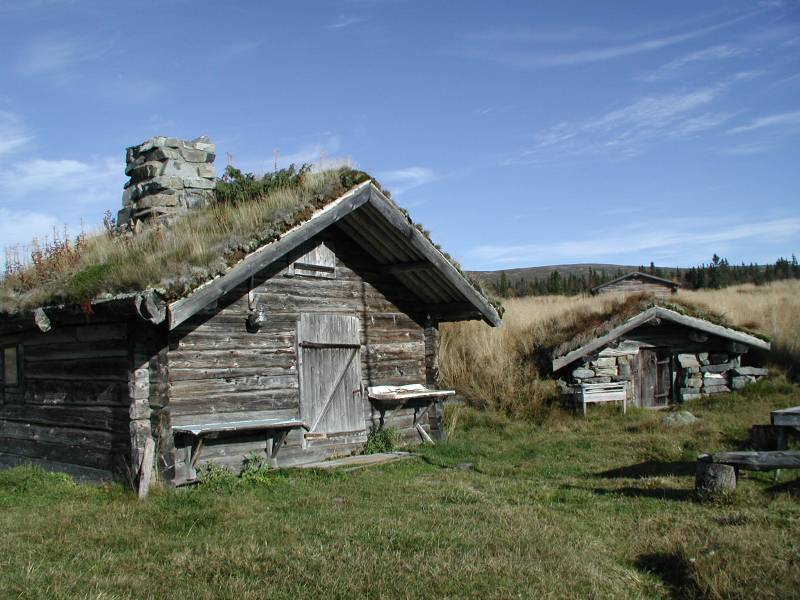 Die Alm Östra Arådalen in Jämtland, Schweden; the mountain pasture Östra Arådalen in Jämtland, Sweden